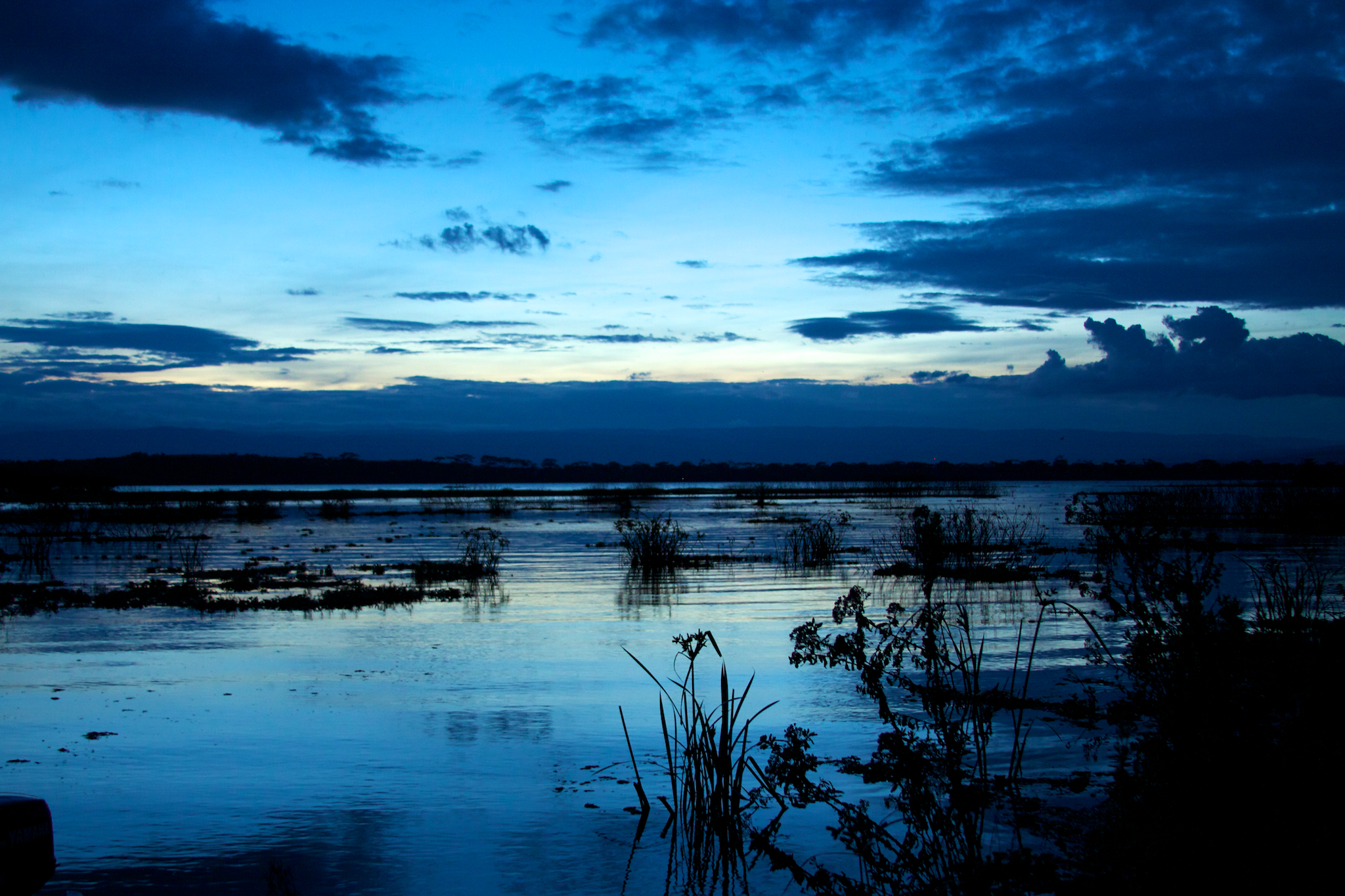 Quiet dusk over Lake Naivasha